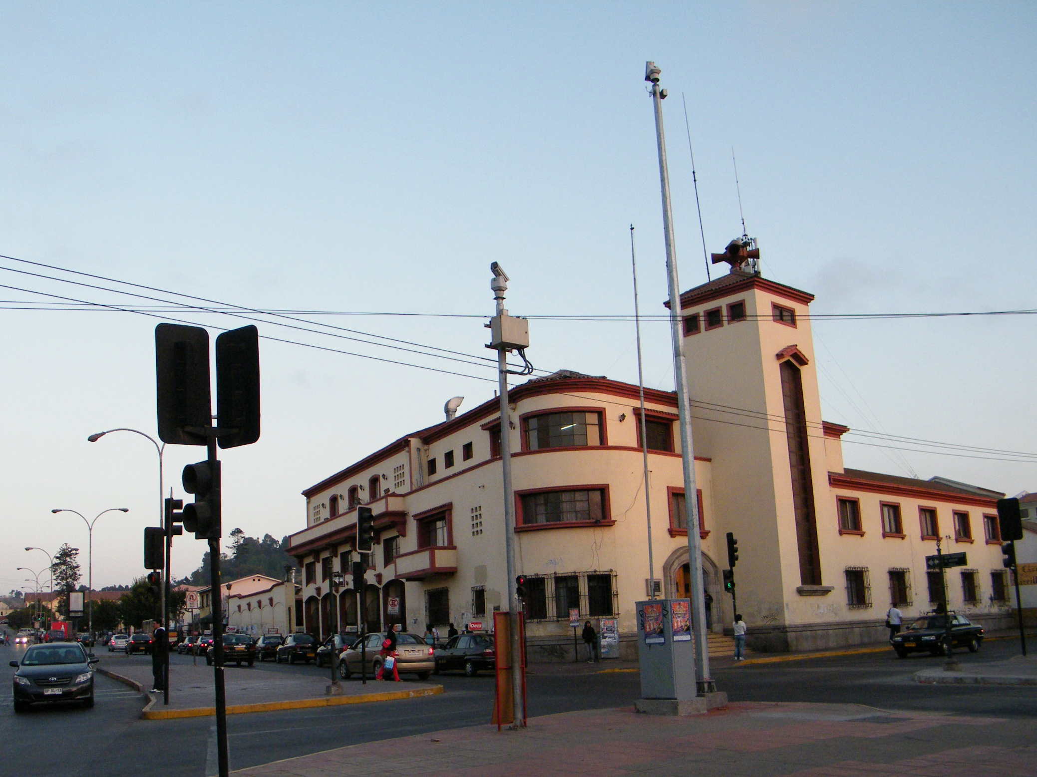 Centro histórico de La Serena, cuartel de bomberos. Arquitectura moderna en su volumetría, pero de estilo neocolonial en su ornamentación. This is a photo of a national monument in Chile: 602